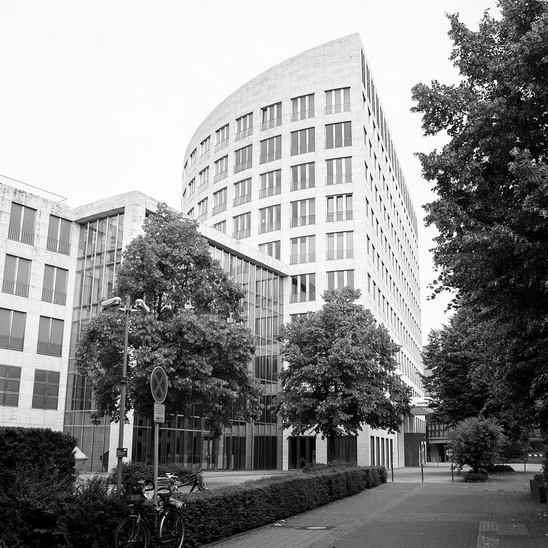 E.On Verwaltungsgebäude am E.ON-Platz 1 in Düsseldorf, gesehen von der Scheibenstraße